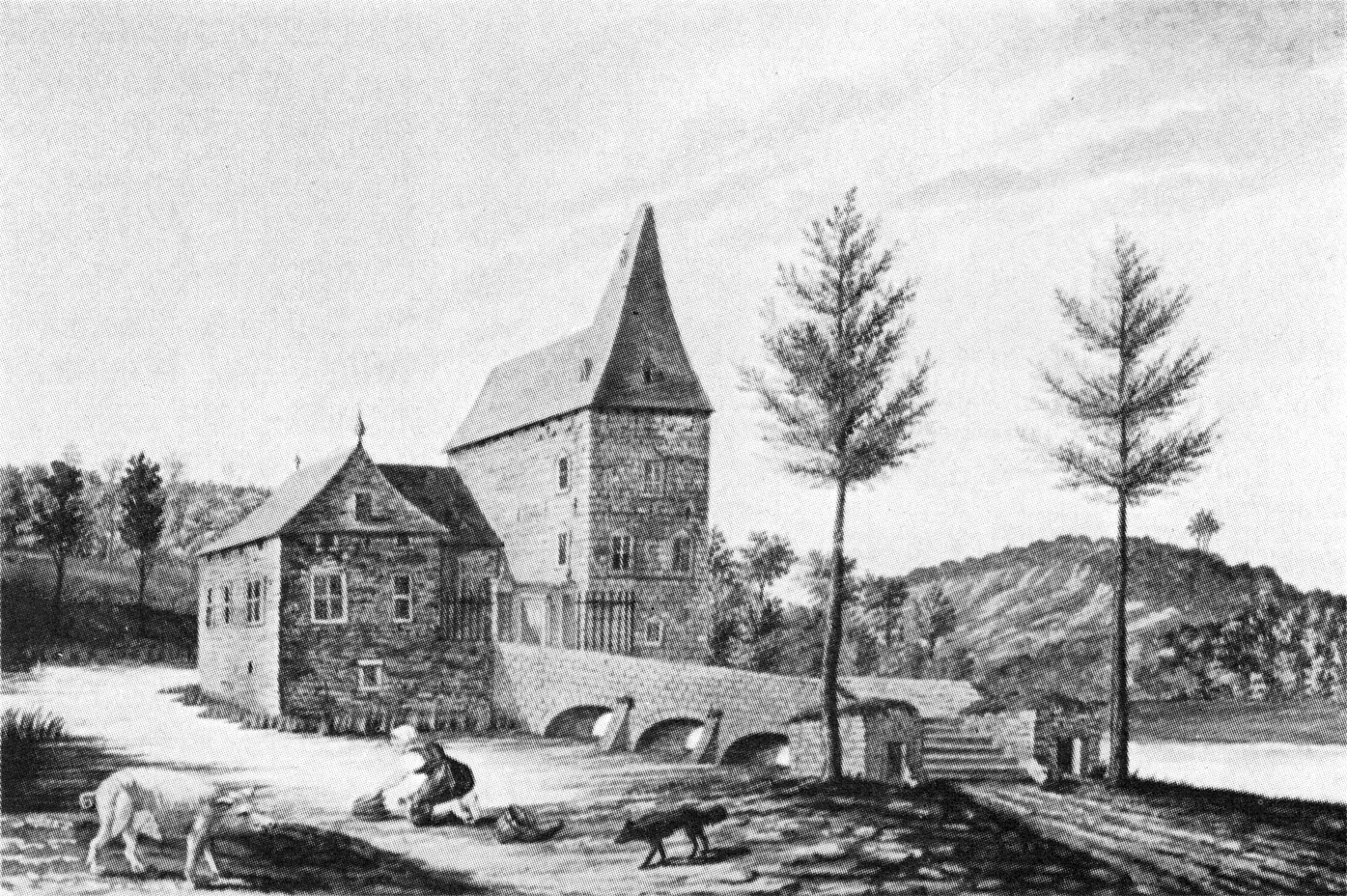 Aquarell des Soerser Hauses in Aachen-Laurensberg